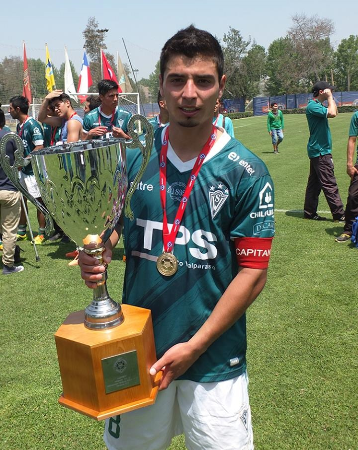 Fotografía del jugador de fútbol Kevin Valenzuela tomando el trofeo de la categoría sub 19 de Chile.